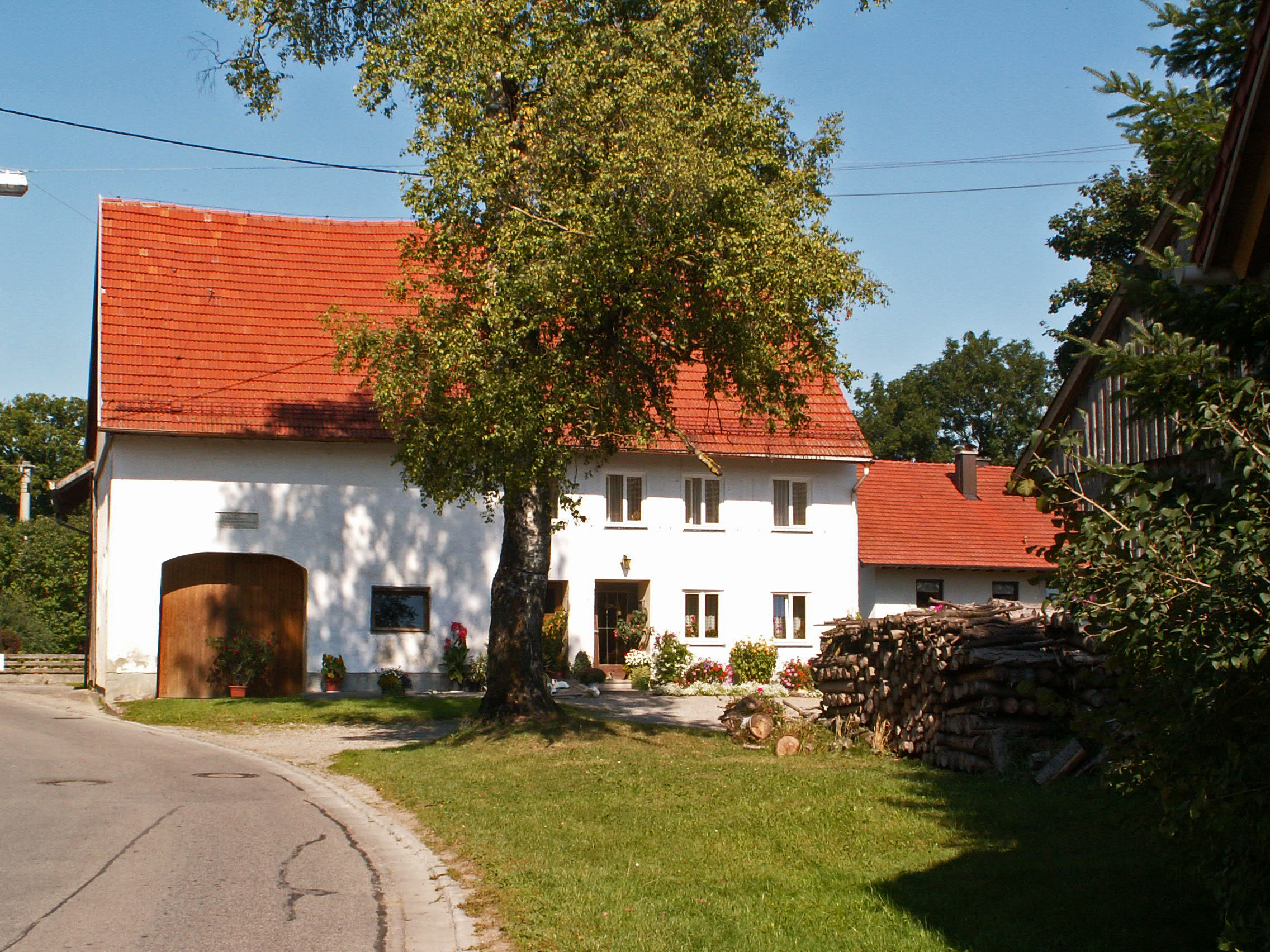 Hörmannstr. 28 in Gutenberg, Oberostendorf